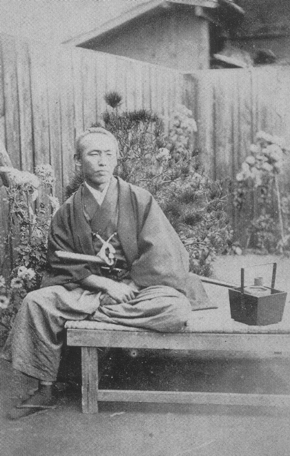 坂本龍馬座像 Sakamoto Ryōma 鶏卵紙